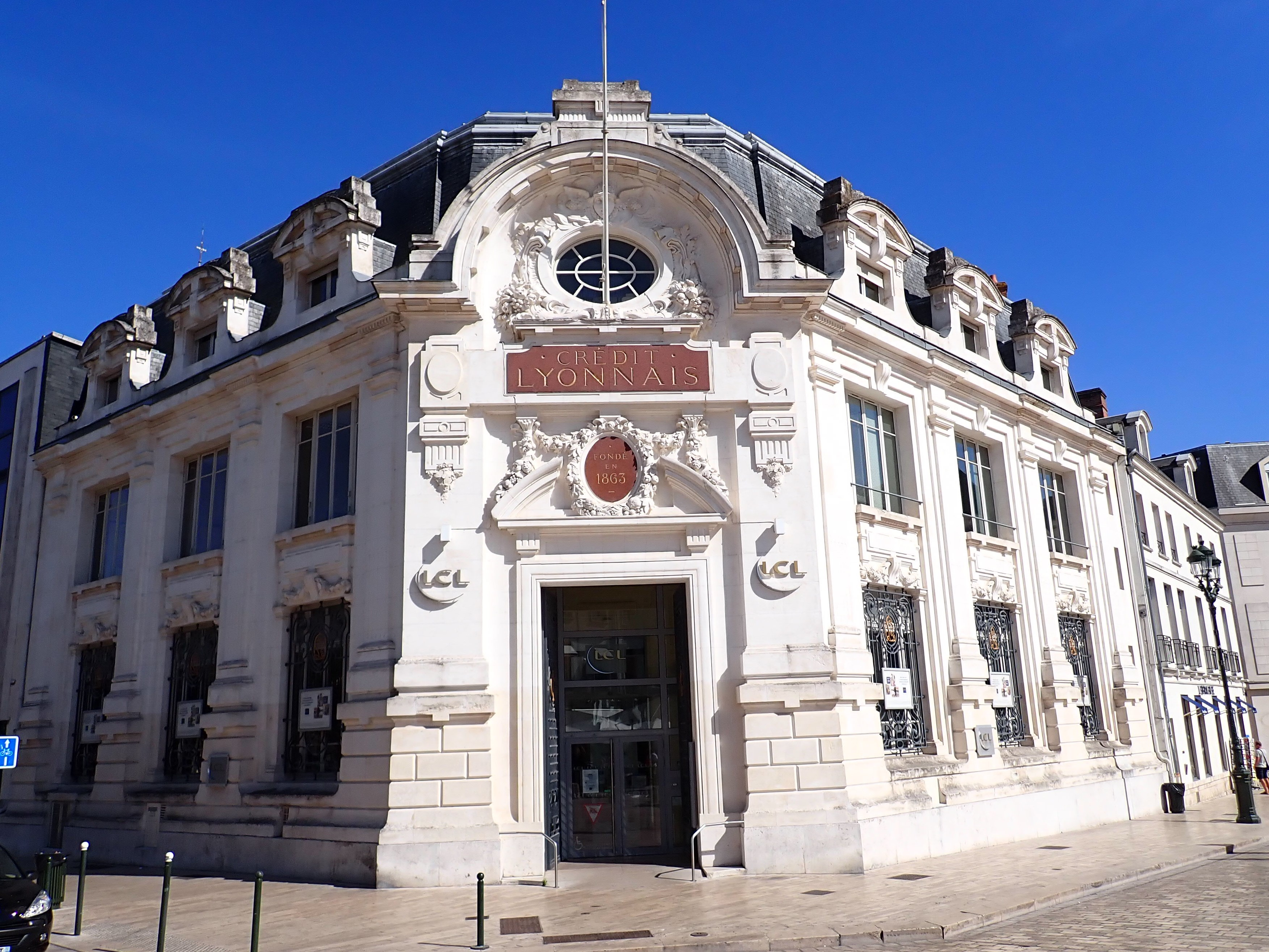 Filiale der Credit Lyonnais in Orleans, Frankreich